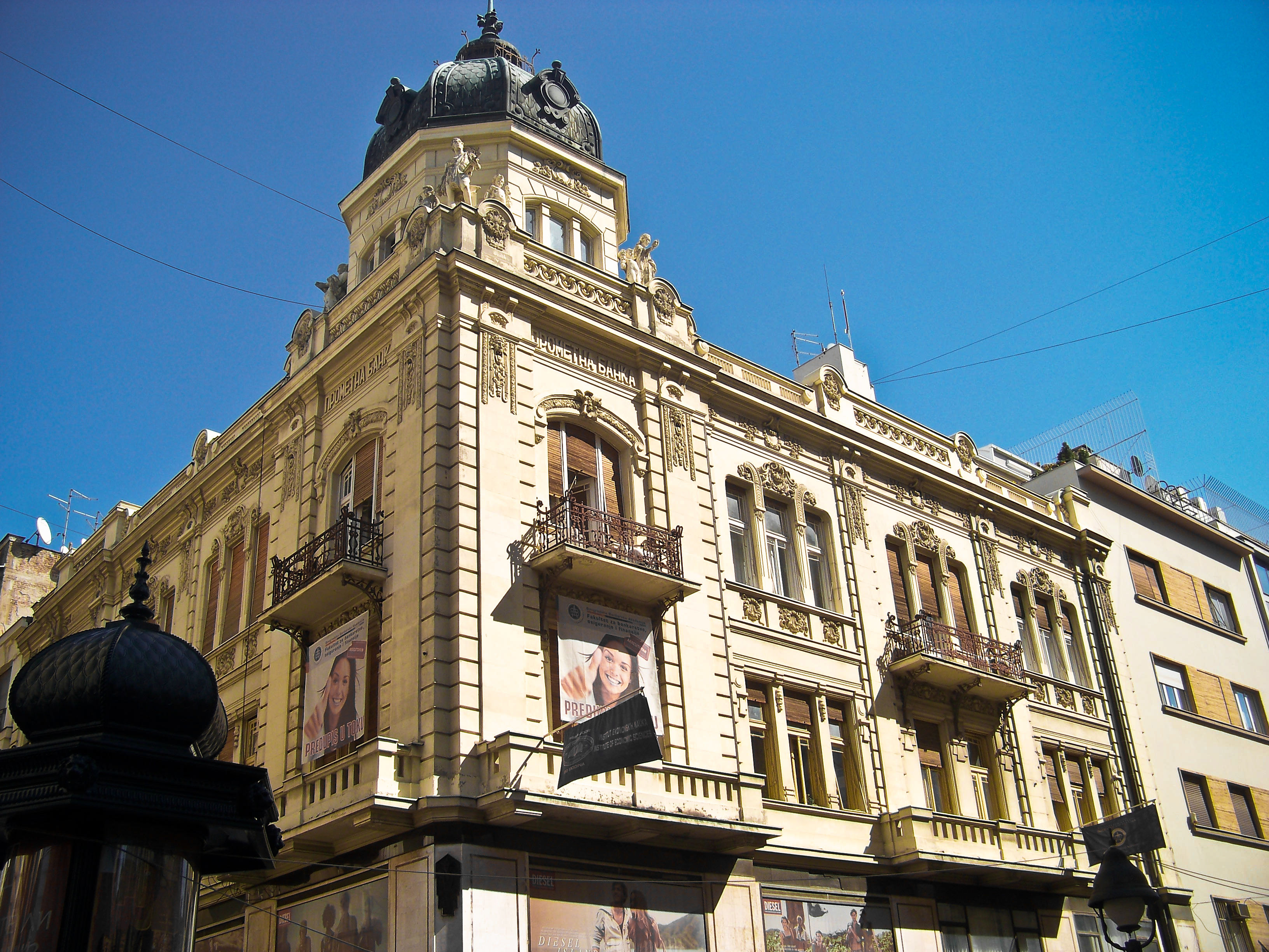 Зграда Прометне банке, угао Кнез Михаилове 26 и Змај Јовине 12.